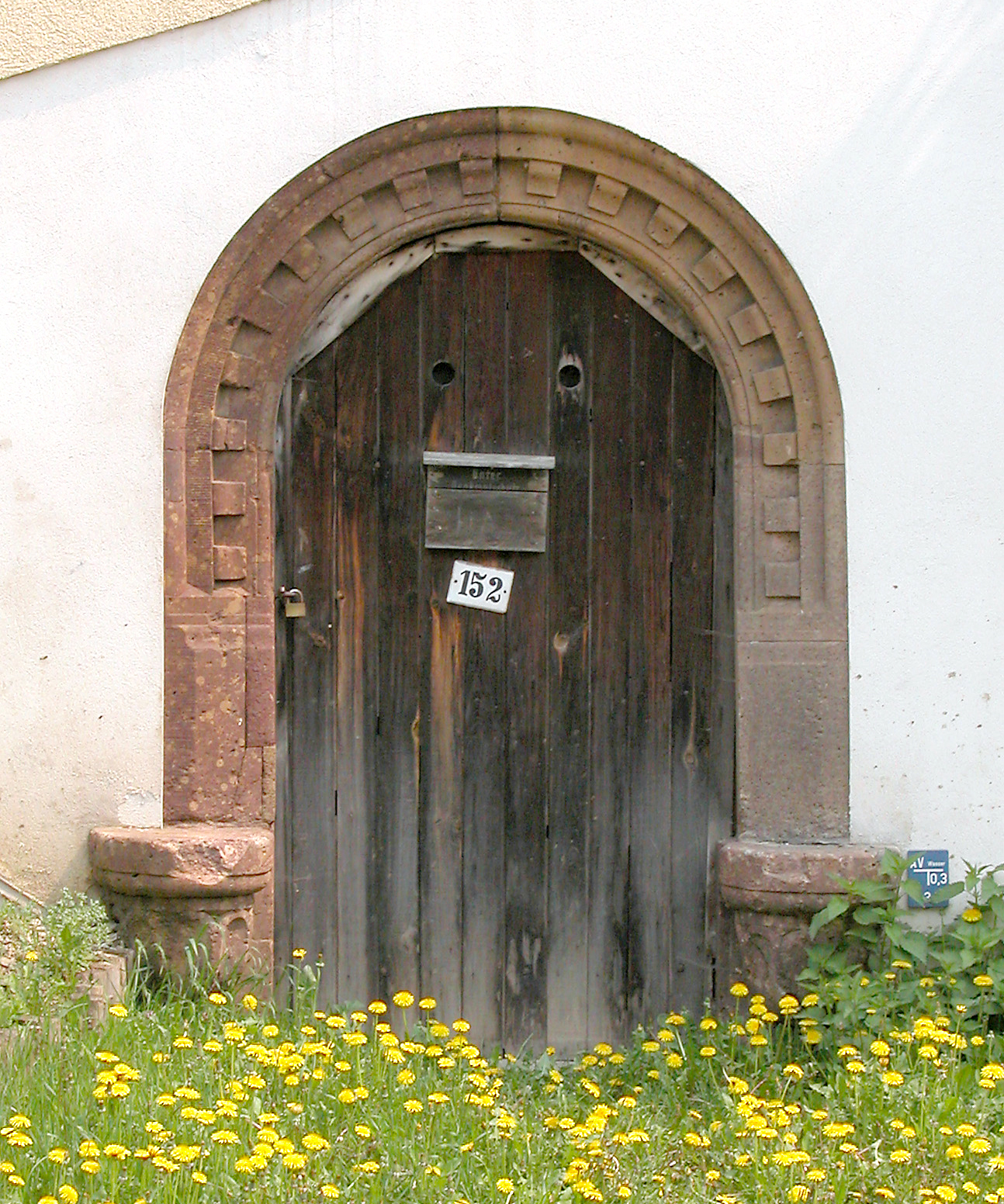 06.05.2006 09244 Auerswalde (Lichtenau) Auerswalder Hauptstraße 152: Im sog. Kellerhaus (GMP: 50.901616,12.911871) auf der Straße gegenüber ist ein Renaissanceportal des alten Herrenhauses aus der 2. Hälfte des 16. Jh. eingefügt worden, als Herren von Auerswalde hier ihren Sitz hatten. [DSCN9838.TIF]20060506045.JPG(c)Blobelt